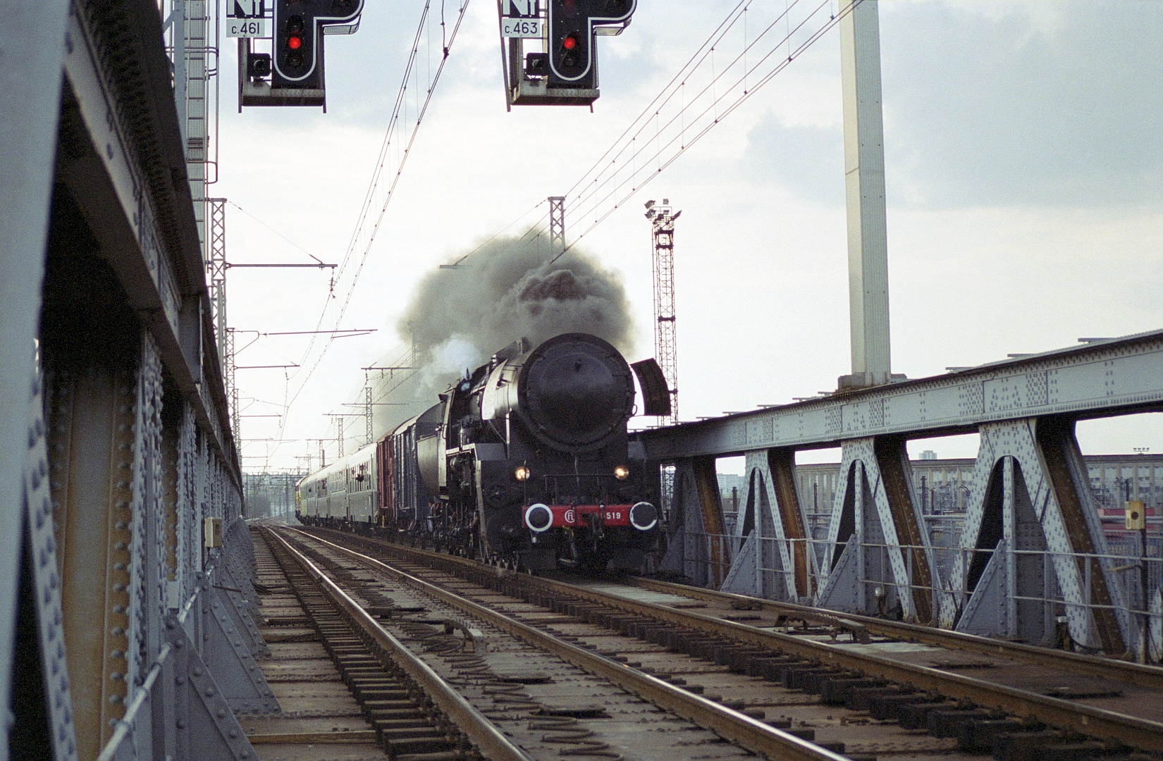 La locomotive type BR 42 N°5519 des CFL sur la Grande-Ceinture à Villeneuve-Saint-Georges, lors de sa venue à Paris le 30 mars 2002.